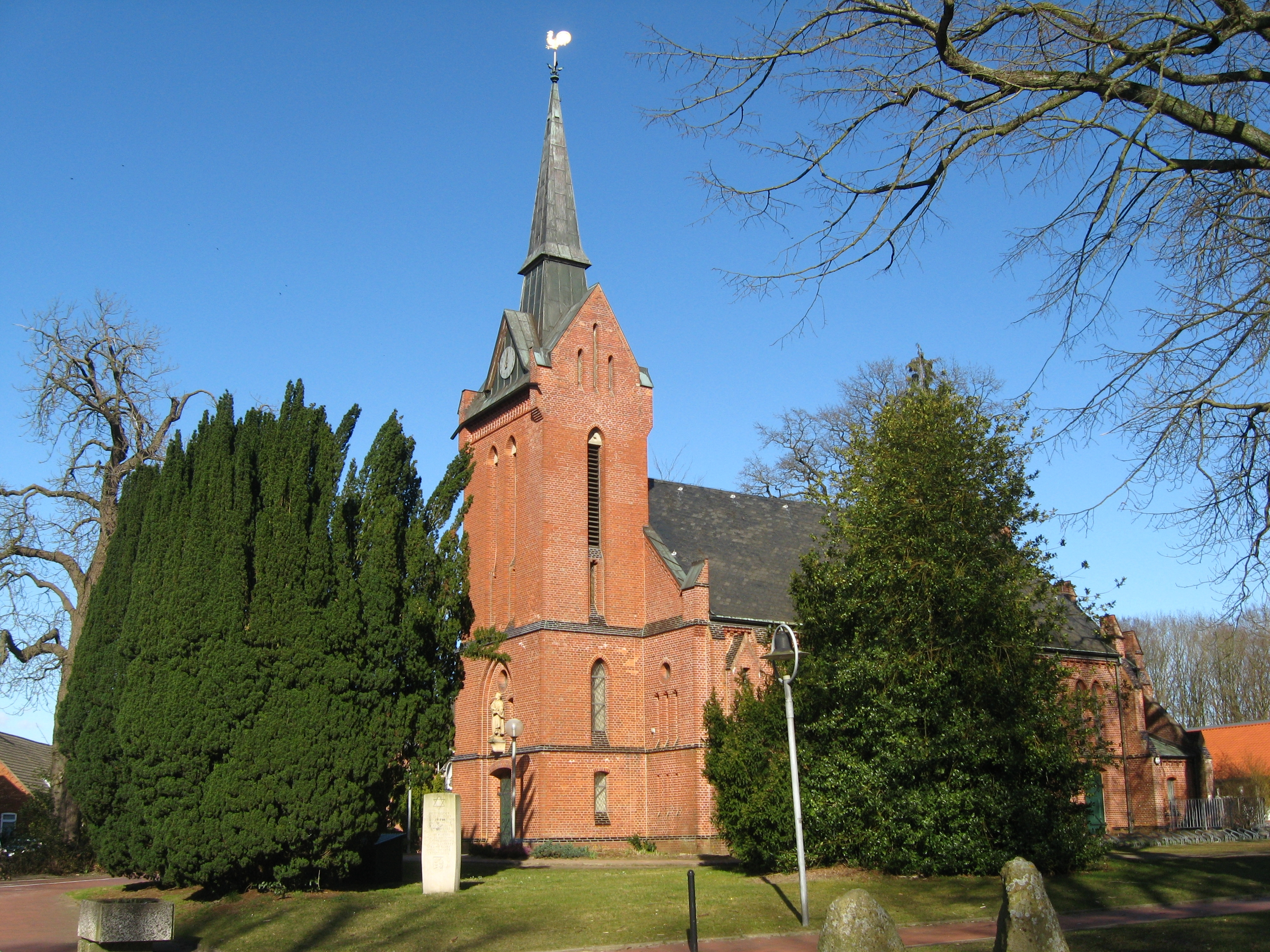 Martin Luther Kirche in Hagen im Bremischen (im Vordergrund links ein Gedenkstein für die 1938 abgebrannte Hagener Synagoge) Datum: 28.03.2011 Urheber: M. Pfeiffer alias Benutzer:Gordito1869 Quelle: privates Fotoarchiv des Urhebers